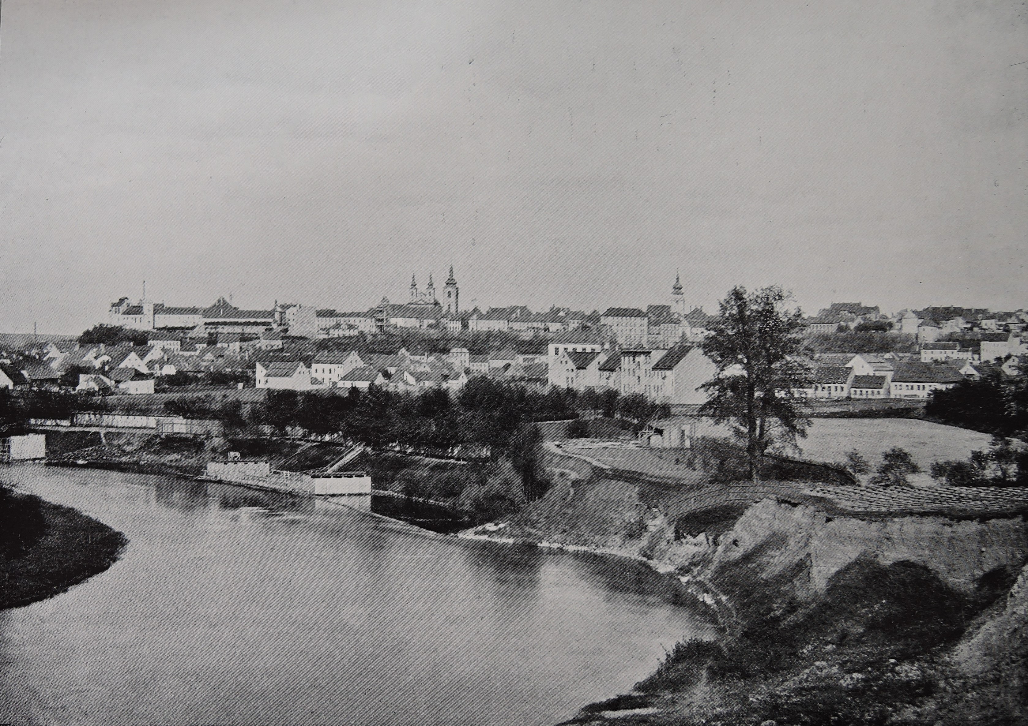 Blick über die Eger auf Saaz mit Flußbadeanstalt und Zerstörungen am Egerufer durch Hochwasser